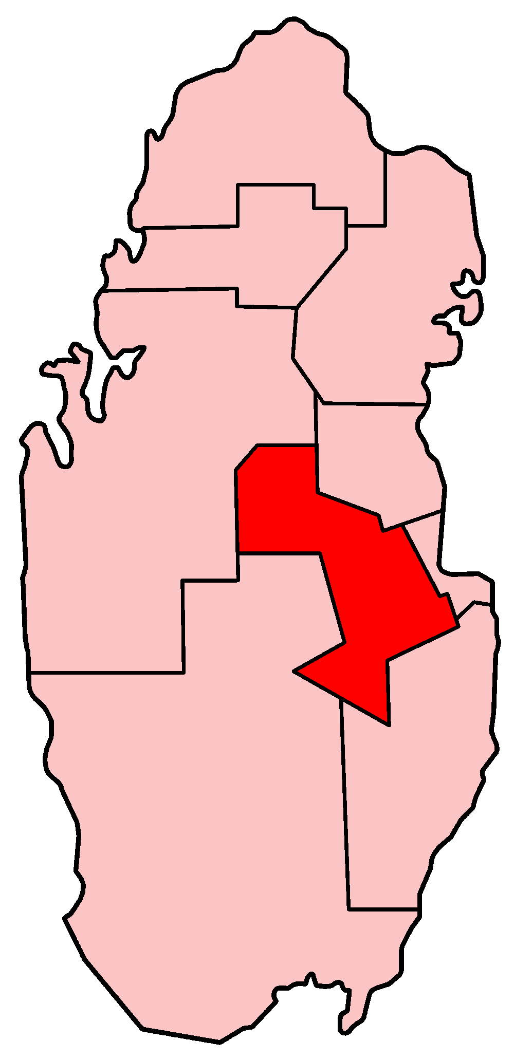 Situación de Ar Rayyan en Qatar. Map of Qatar showing Ar Rayyan governorate. Made by User:Golbez.